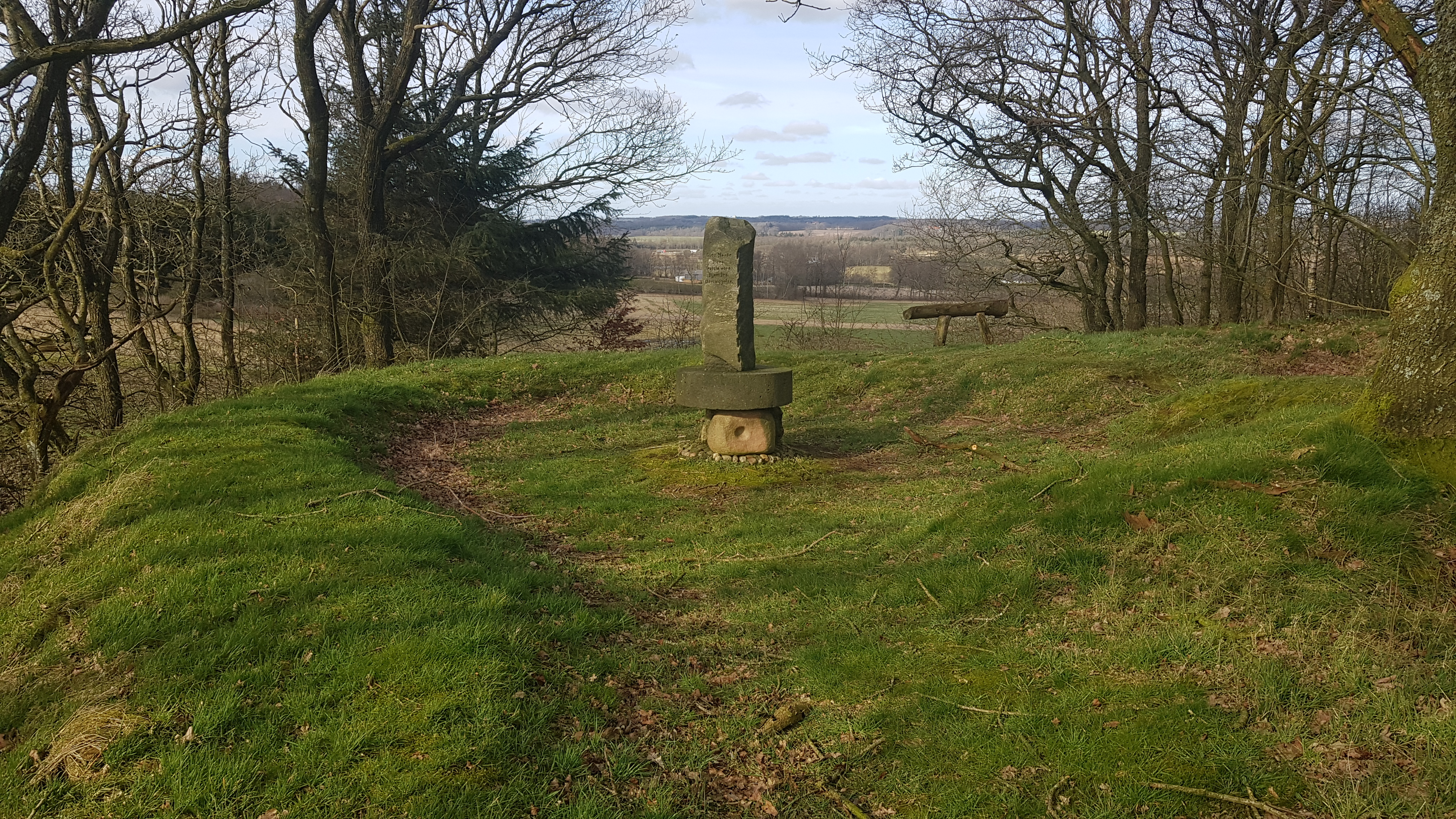 Kanonstillingen ved Dover